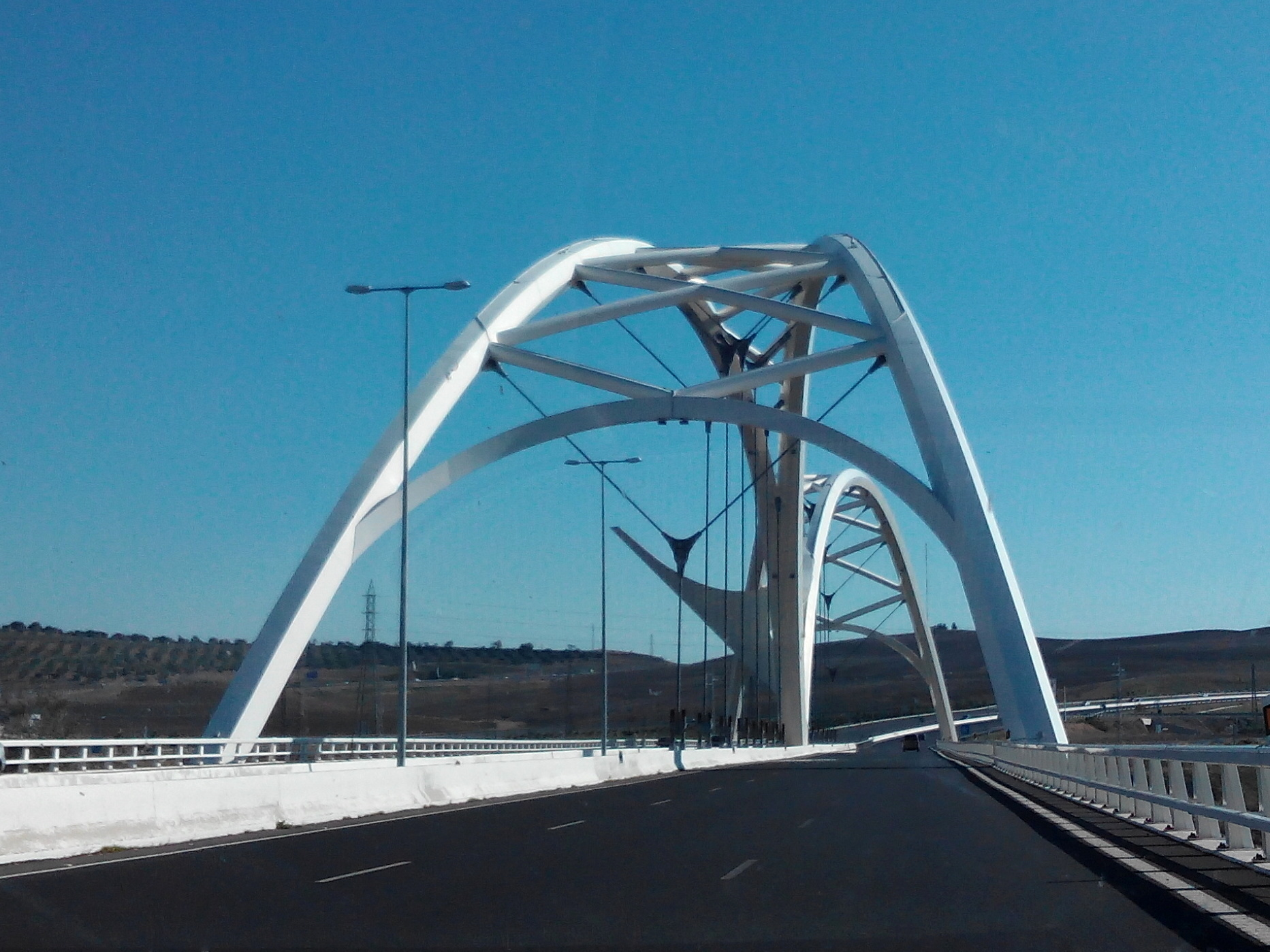 Puente de Abbas Ibn Firnas sobre el río Guadalquivir a suu paso por Córdoba (España).